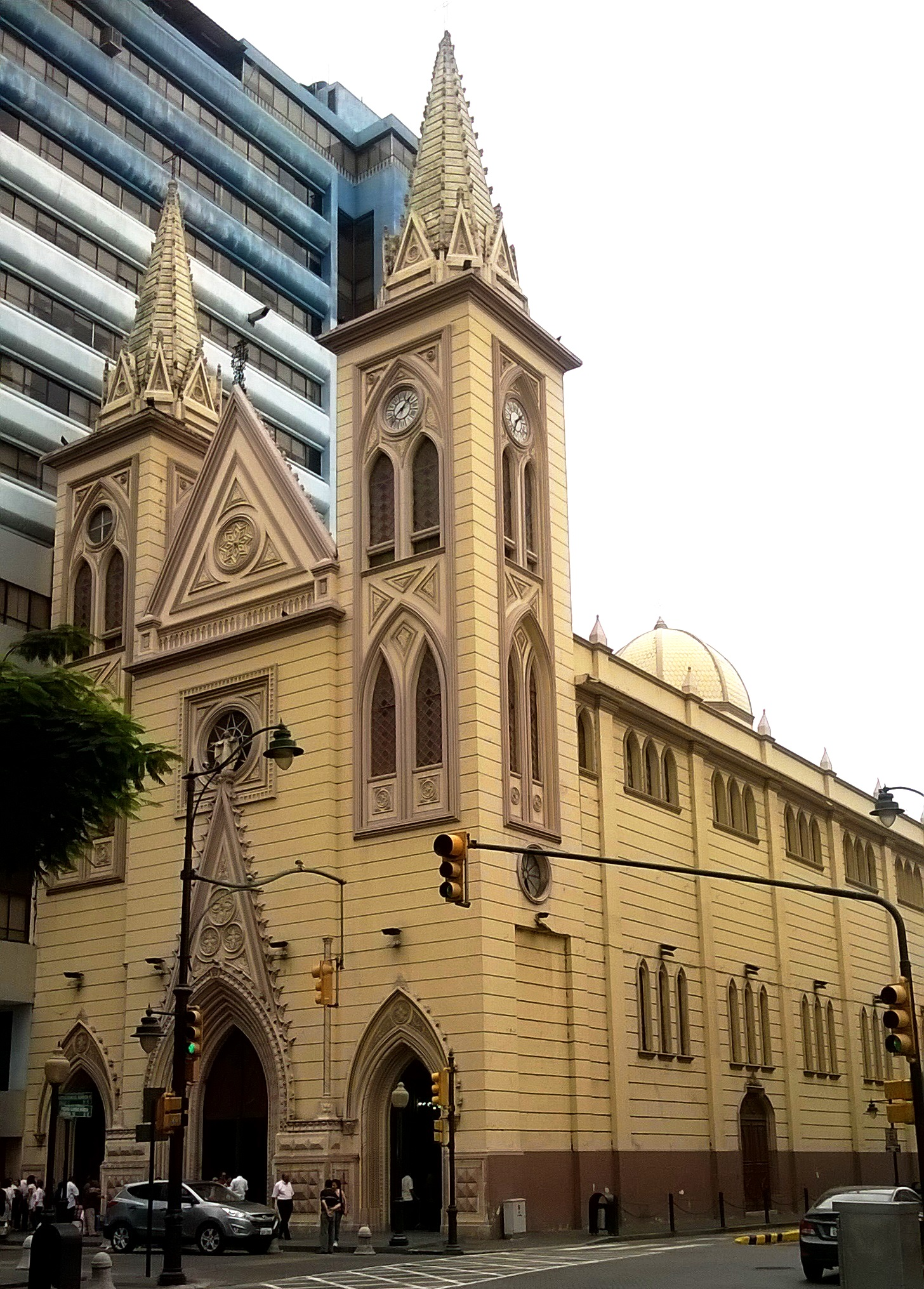 Fachada de la Basílica Menor de la Merced en Guayaquil.